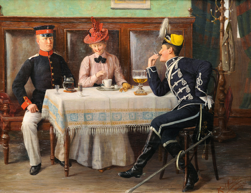 Der ungebetene Gast, Öl auf Leinwand, 56,5 x 72 cm